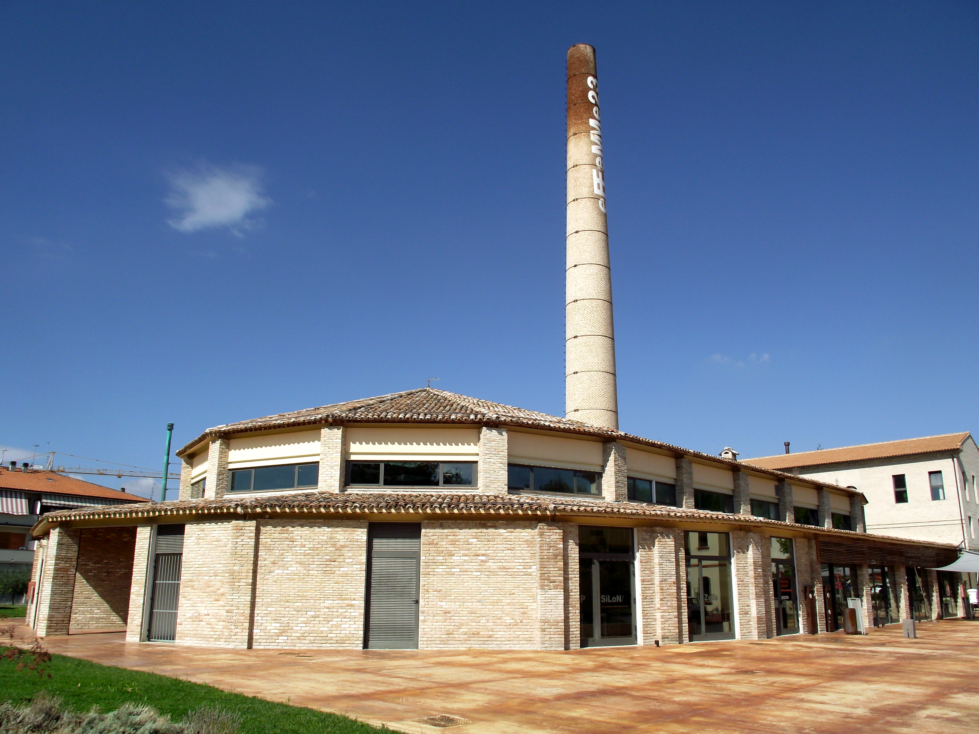 La Biblioteca eFFeMMe23 di Moie (AN)